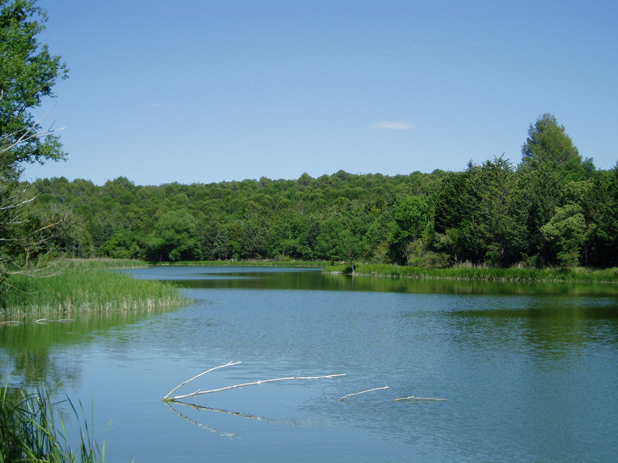 Montes Torozos y páramo de Torquemada-Astudillo This is a photography of a Site of Community Importance in Spain with the ID: ES4140129. Natura2000 entry, EEA entry